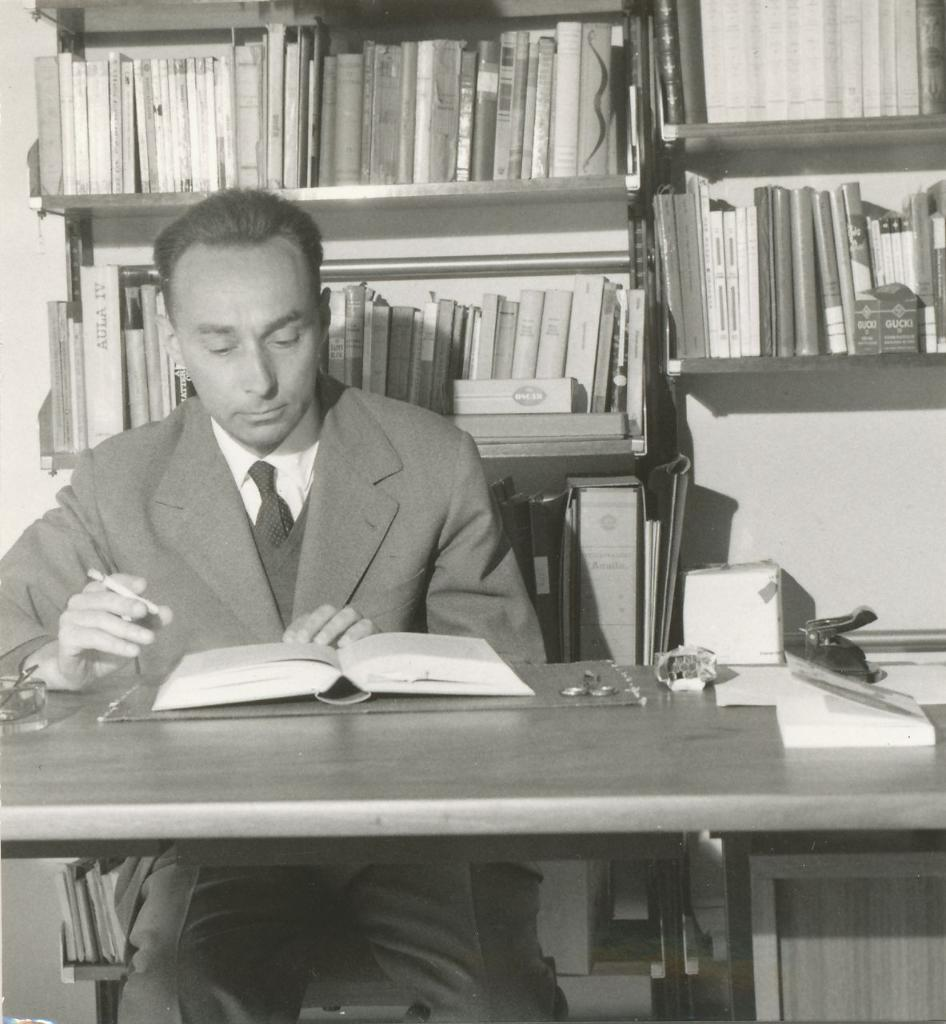 Primo Levi seduto alla scrivania mentre legge con una sigaretta in mano - sullo sfondo scaffali con libri, circa 1960